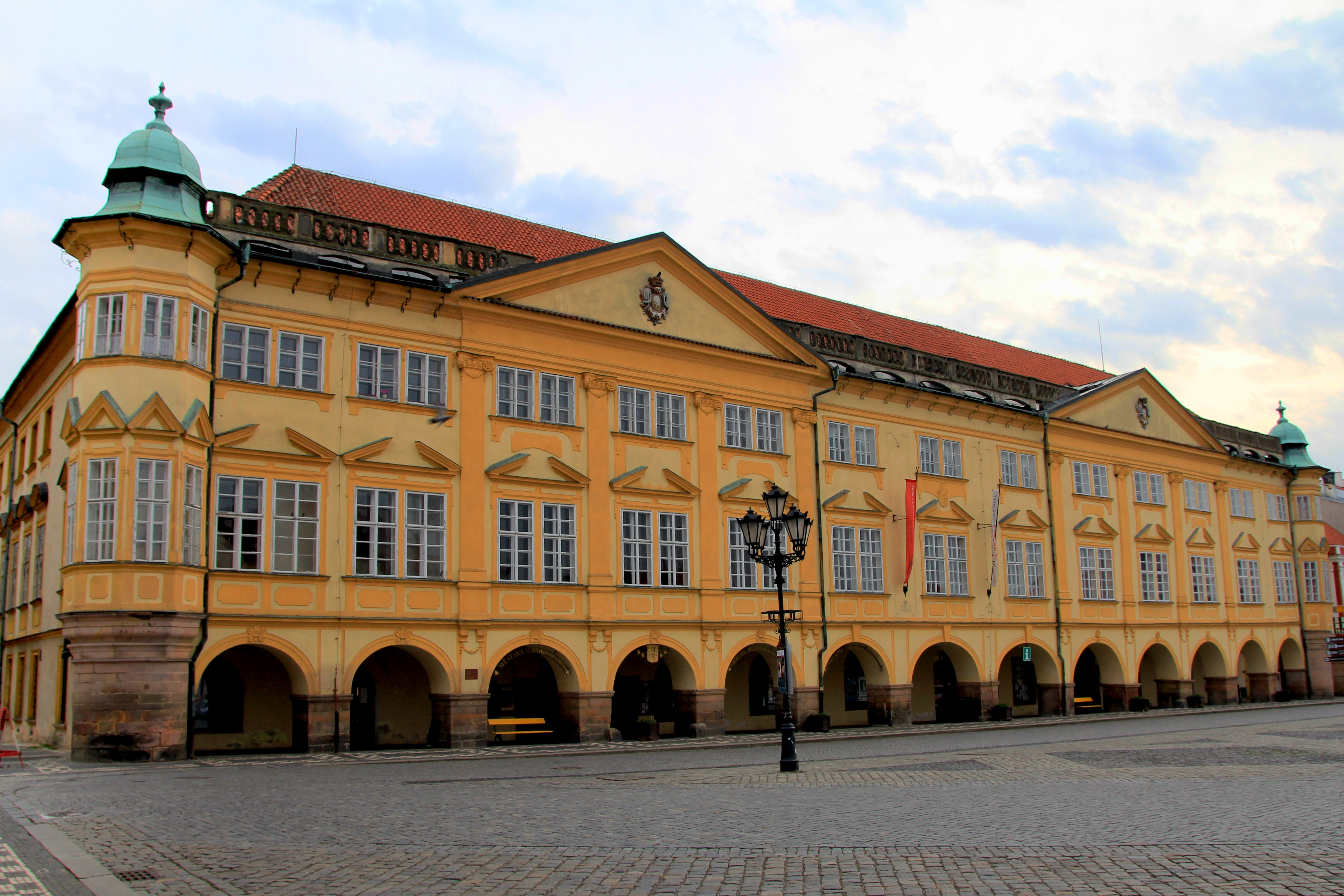 Wallenstein's Palace in Jičín